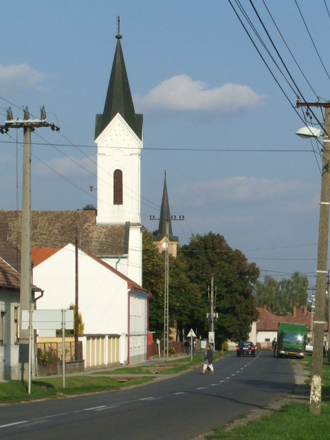 Utcakép: Evangélikus Diakóniai Otthon, evangélikus templom, Árpád-házi Szent Erzsébet római katolikus templom